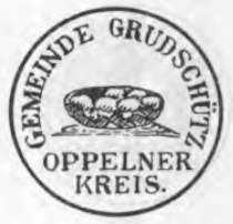 Altes Siegel bzw. Stempel der Gemeinde Grudschütz im Kreis Oppeln.